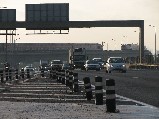 מפגש רכבות על גשר בן-גוריון